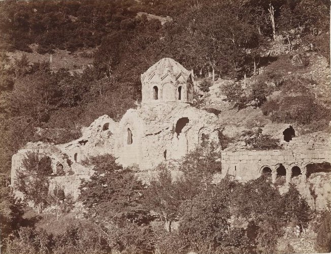 ოპიზას საერთო ხედი